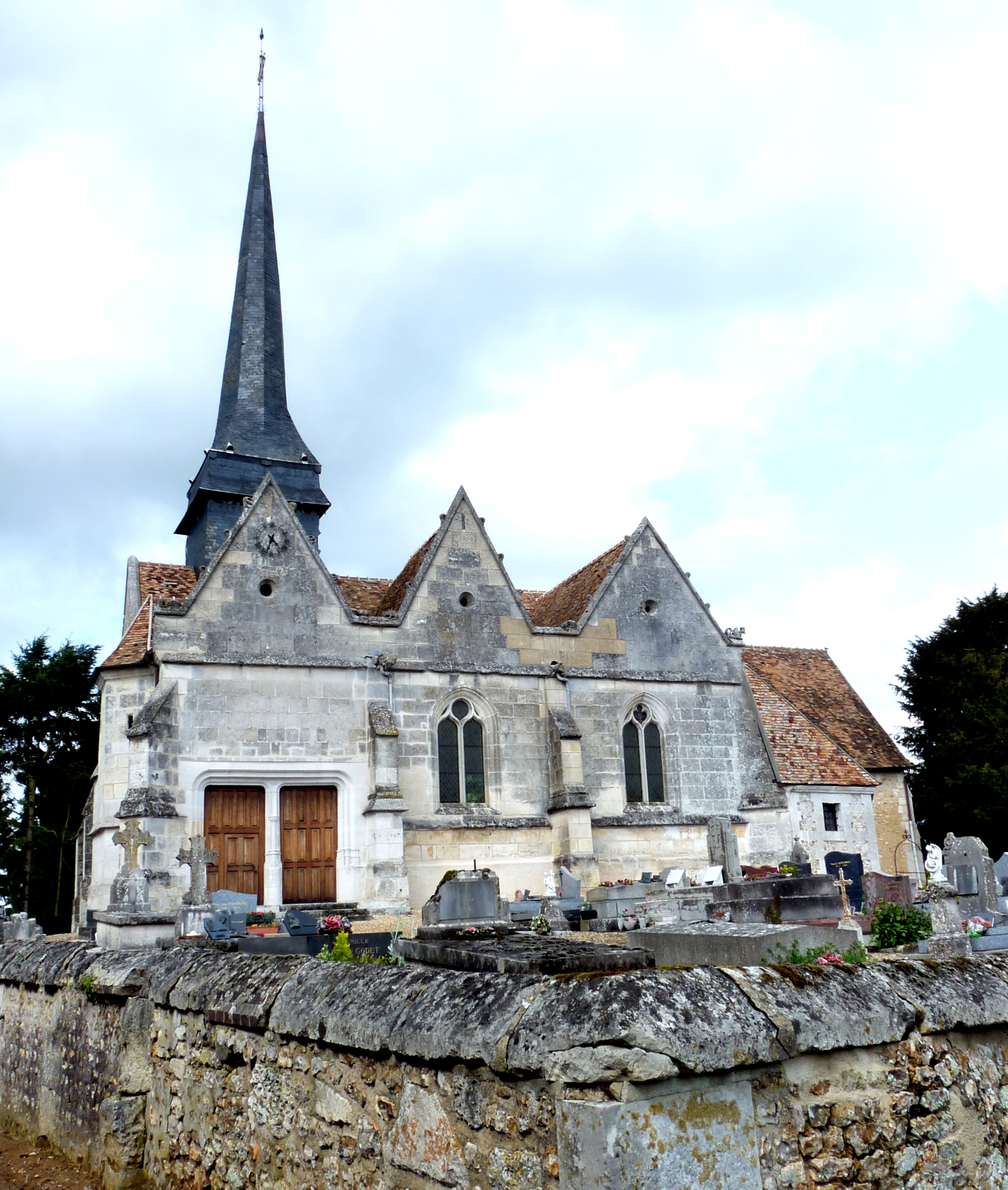 Église Saint-Martin de Crosville-la-Vieille .